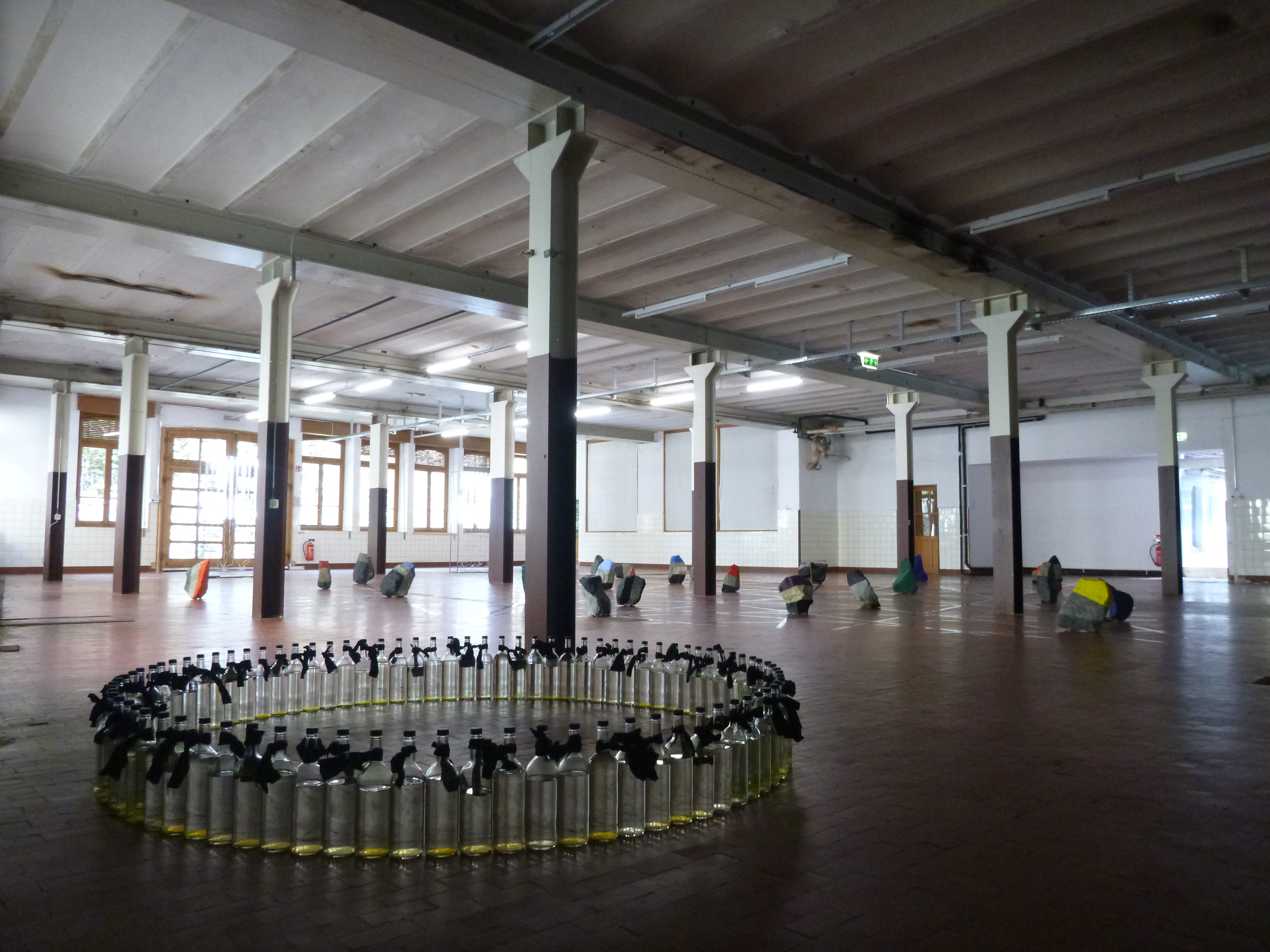 Installation in den Räumen der ehemaligen Schokoladenfabrik Cima-Norma in Dangio-Torre, Schweiz.